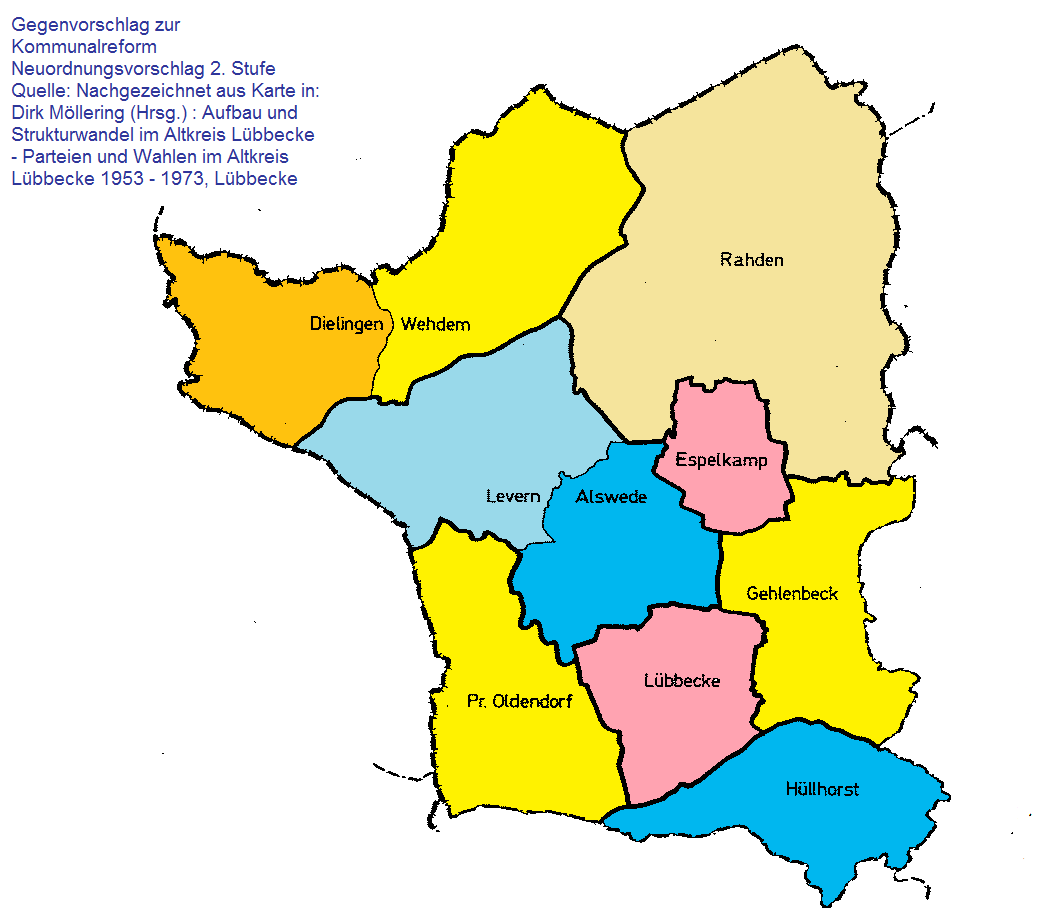 Gliederungsvorschlag für den Kreis Lübbecke